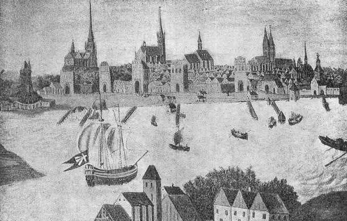 Stralsund sett från Rügen, tryckt i Malmö 1926.